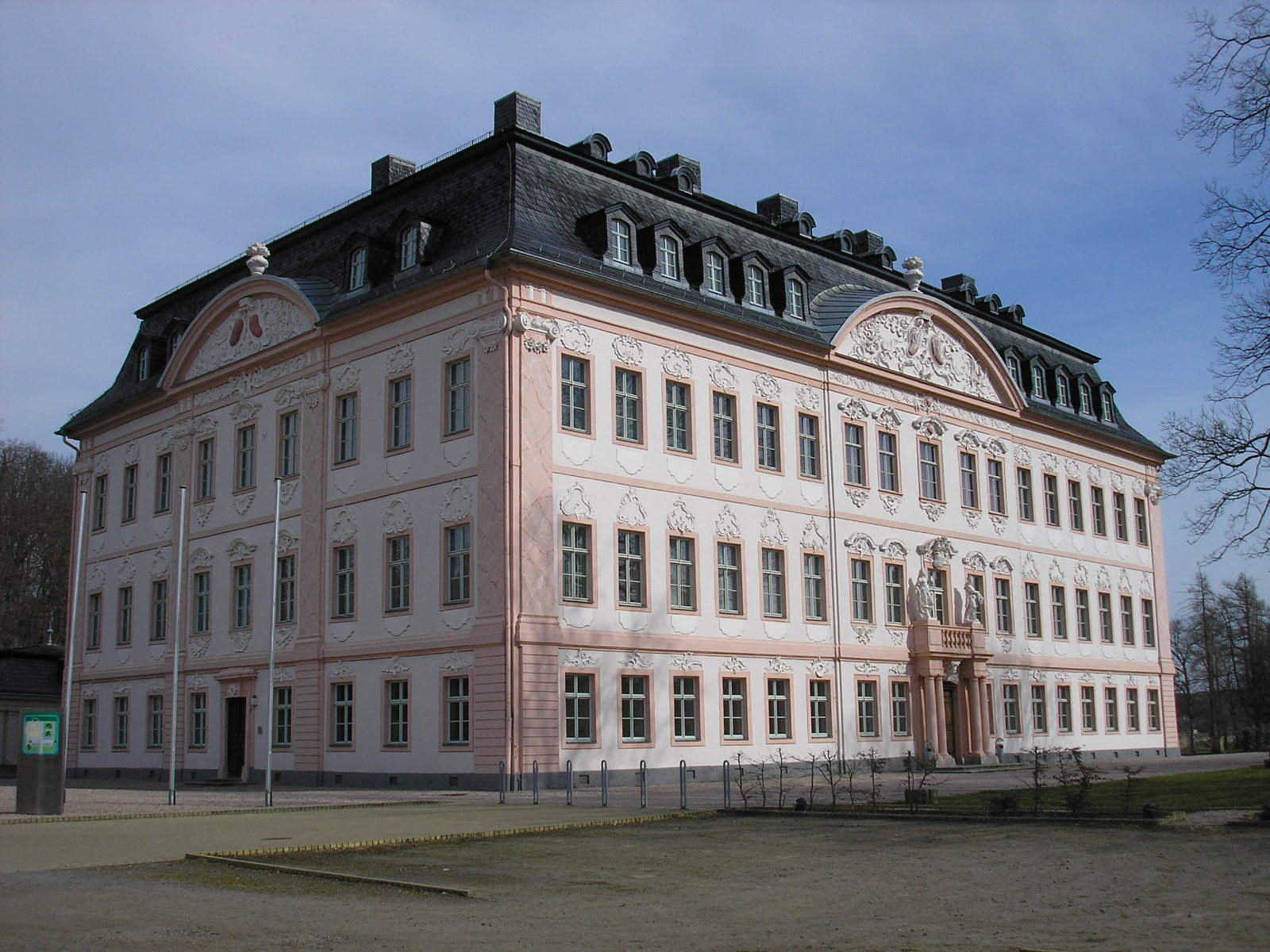 Das Schloss Oppurg (Thüringen) von Süd/West.